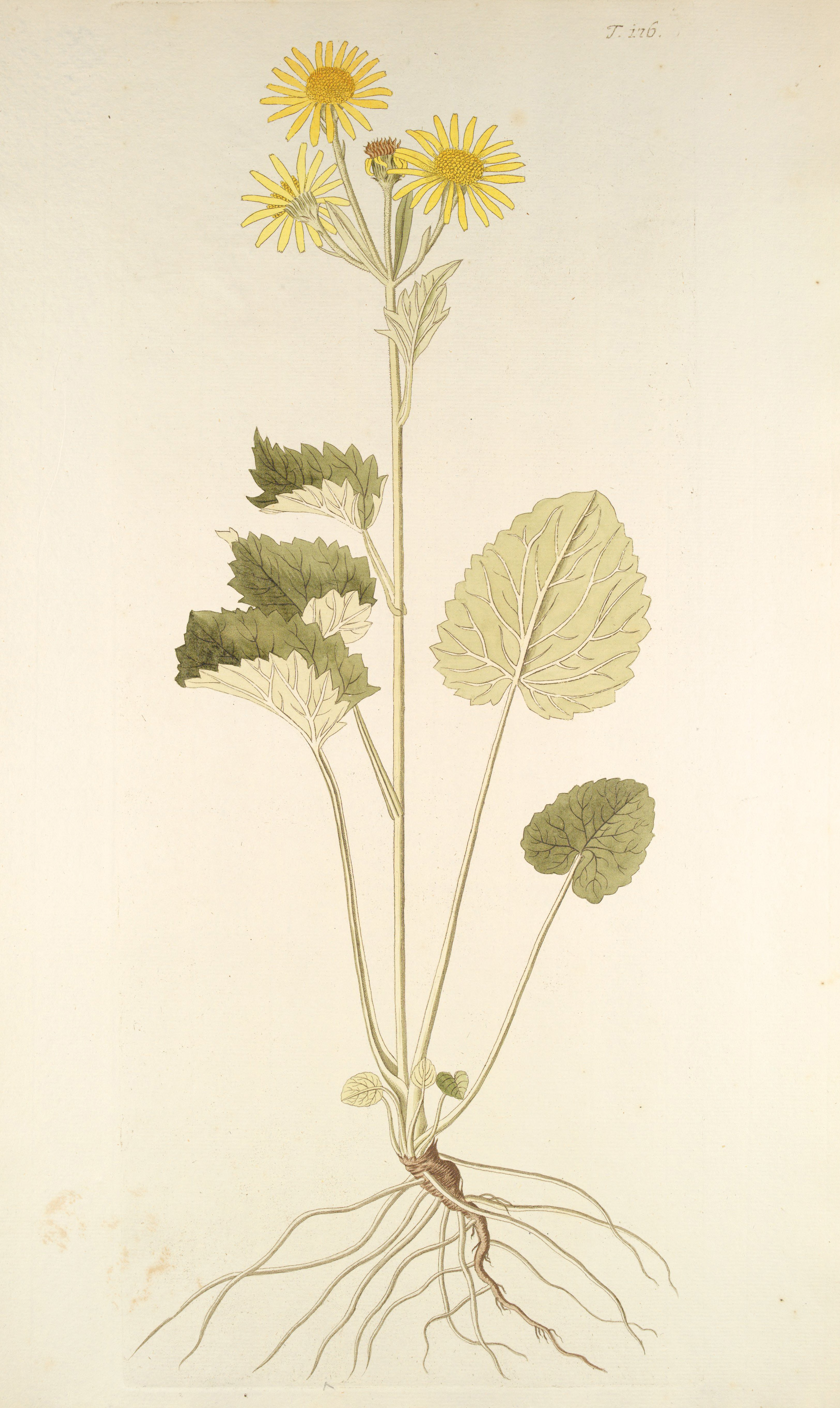 Legende: Ganze Pflanze.